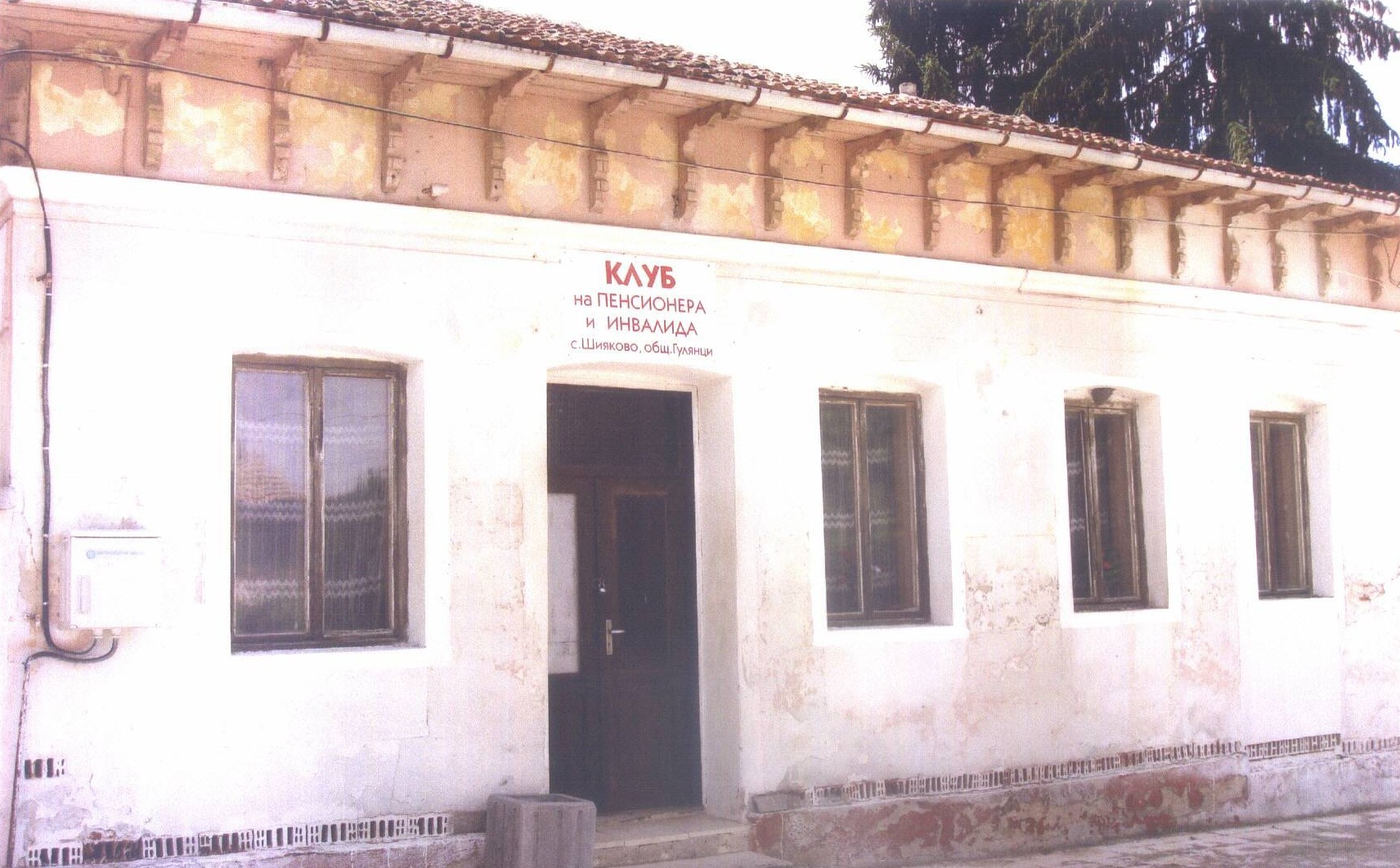 Пенсионерски клуб с.Шияково